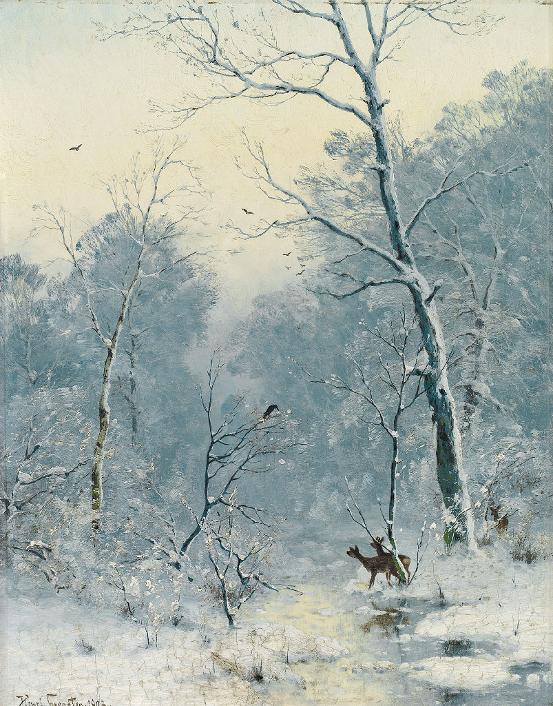 Winterlandschaft mit Rehen und Raben, 1893. Öl/Holz. 40,5 x 32 cm